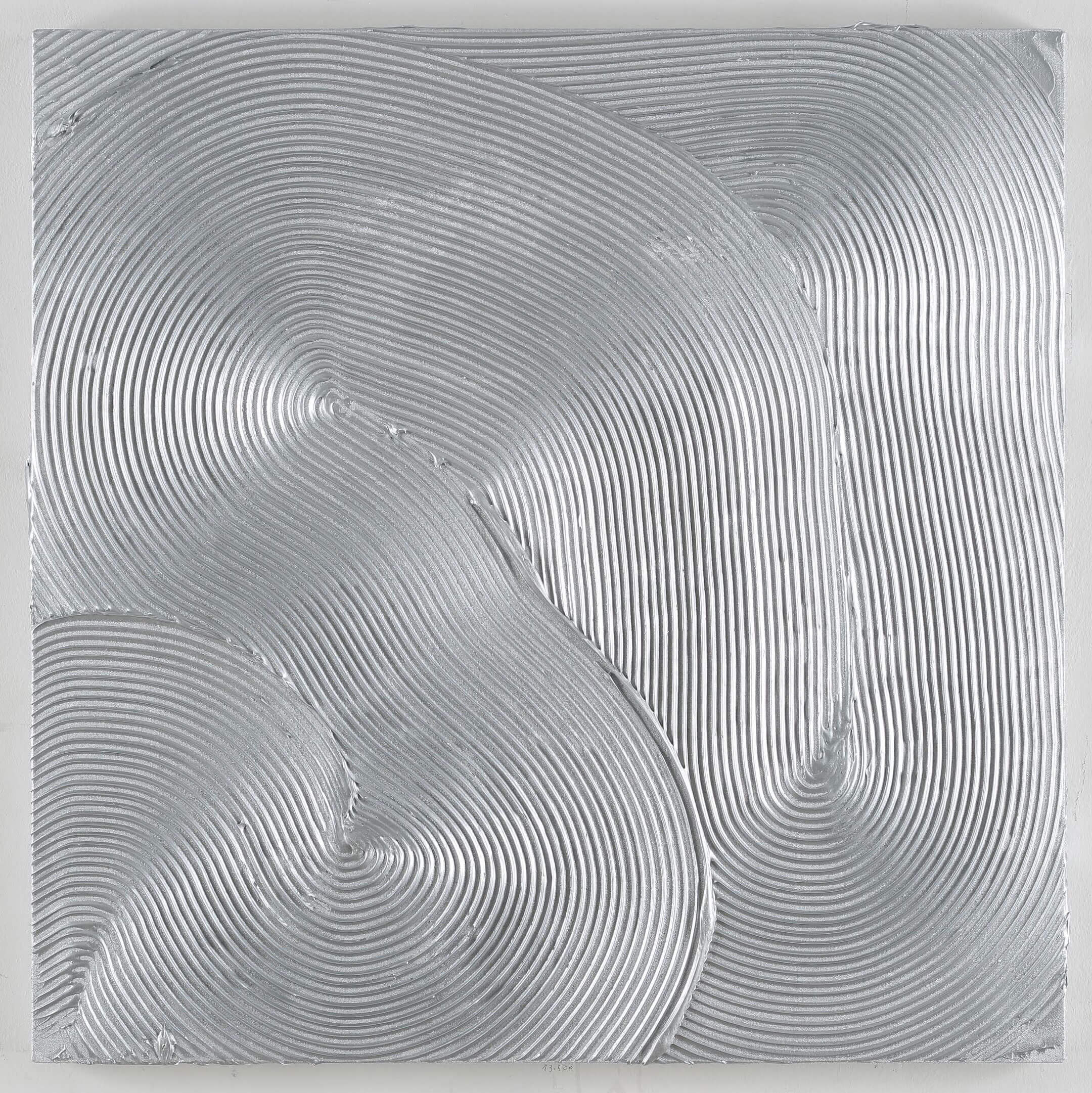 Abbildung eines Werkes von Jakob Gasteiger. Acryl auf Leinwand 90 x 90 cm